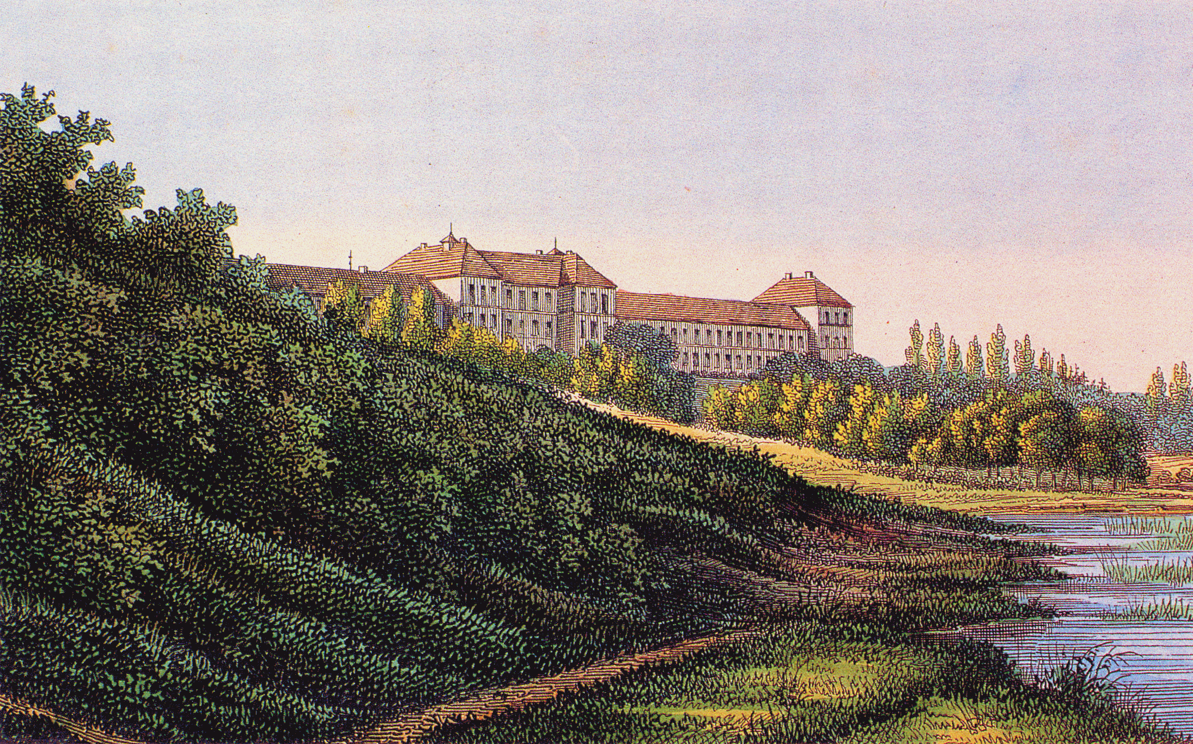 Irrenheilanstalt Sachsenberg